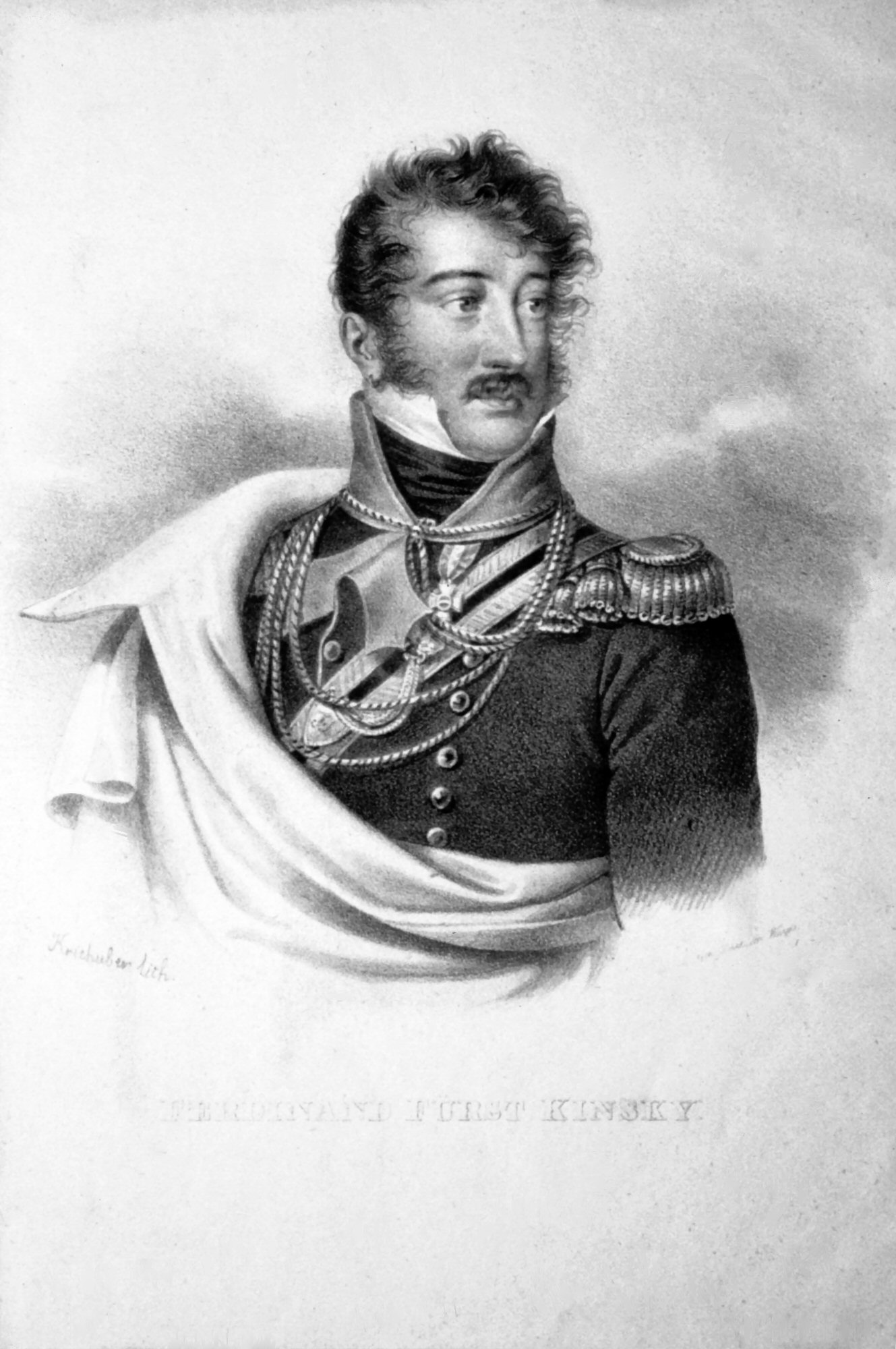 Ferdinand Fürst Kinsky (1781-1812) Offizier, Ritter des Maria-Theresien-Ordens.